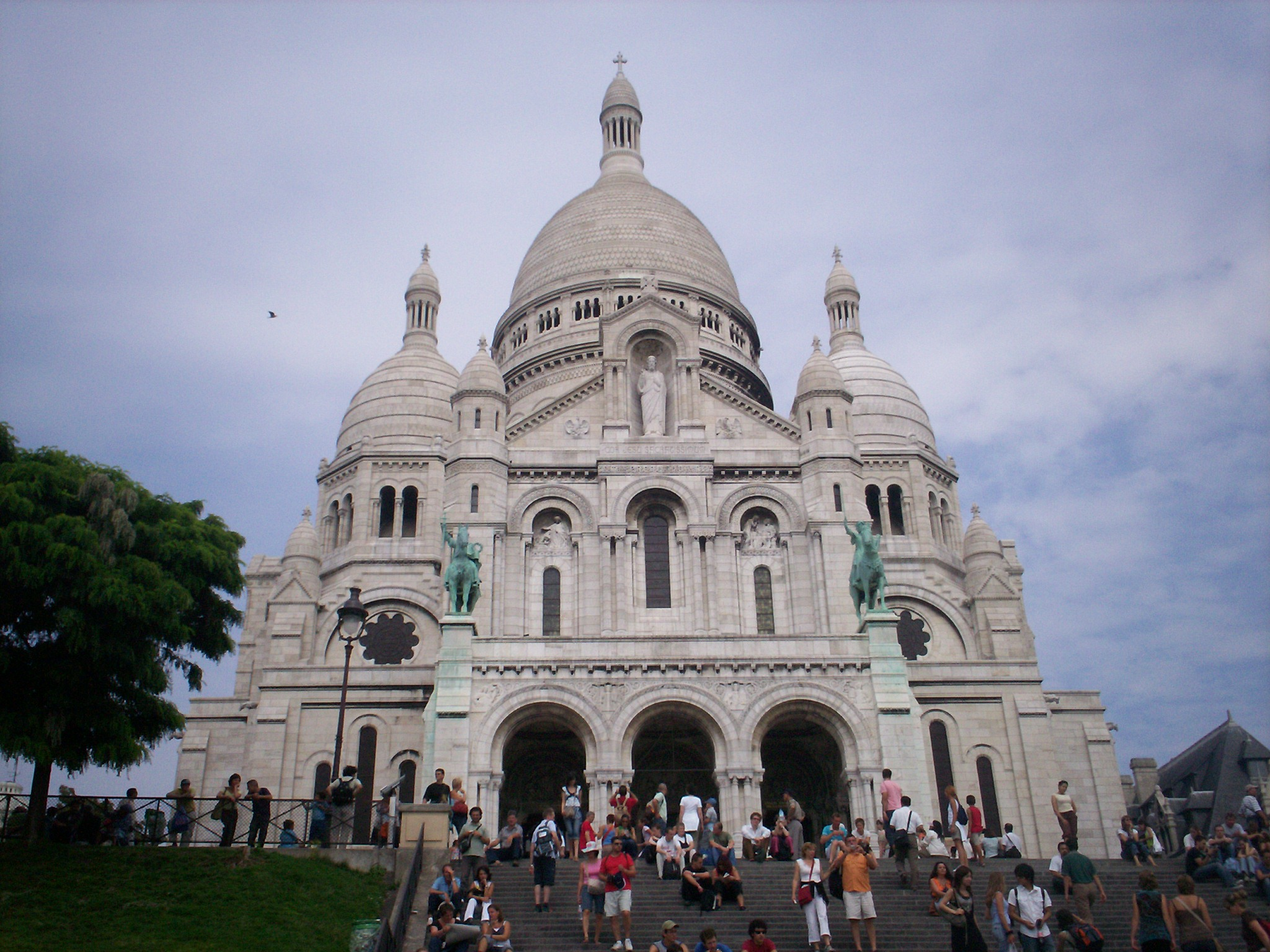 Basilique du Sacré-Cœur de Montmartre